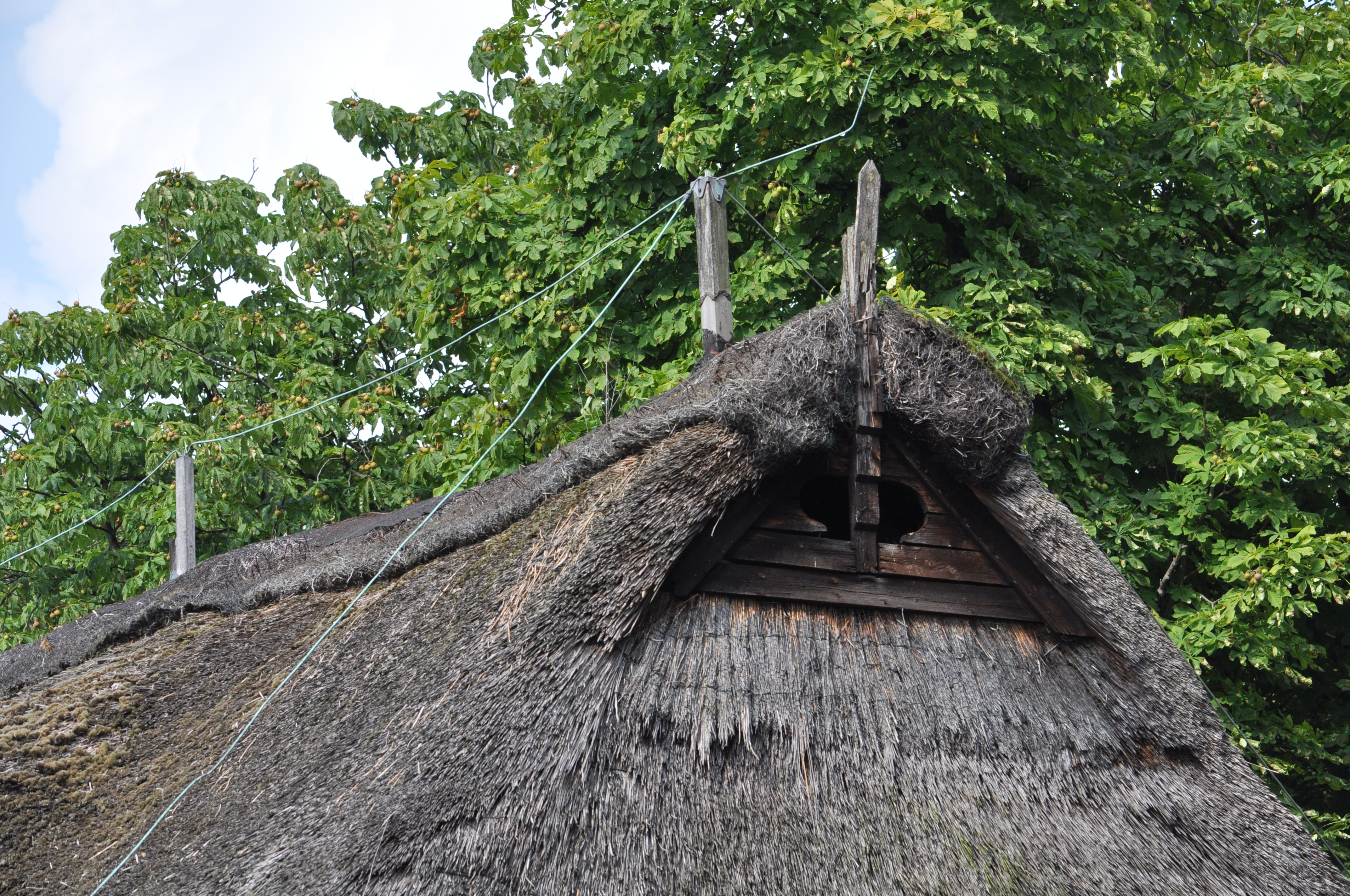 Wohnwirtschaftsgebäude Mellingburgredder 1 in Hamburg-Sasel, Detail. This is a photograph of an architectural monument.